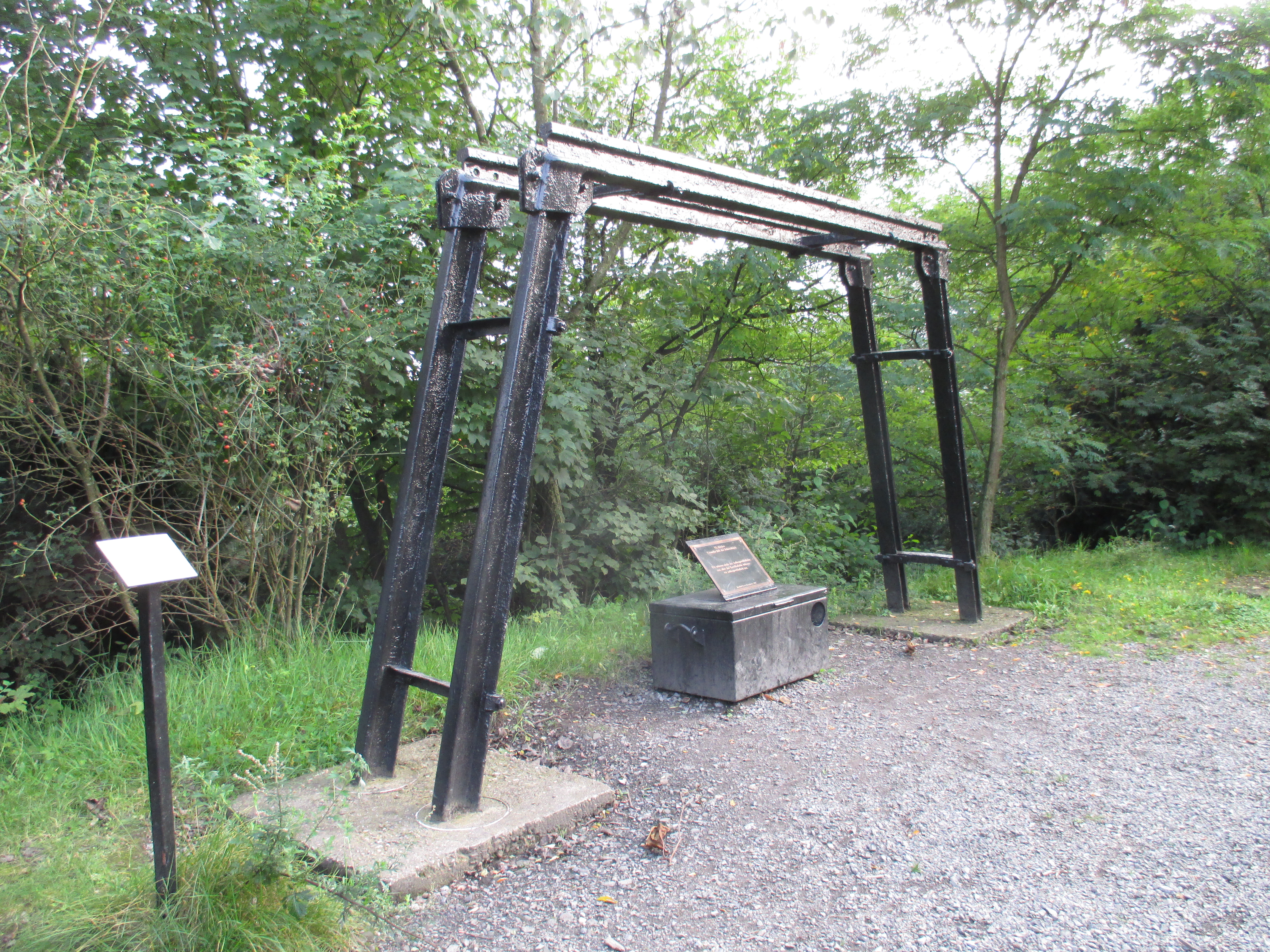 Station 6 des Bergbaukreuzweges an der Halde Haniel in Bottrop.